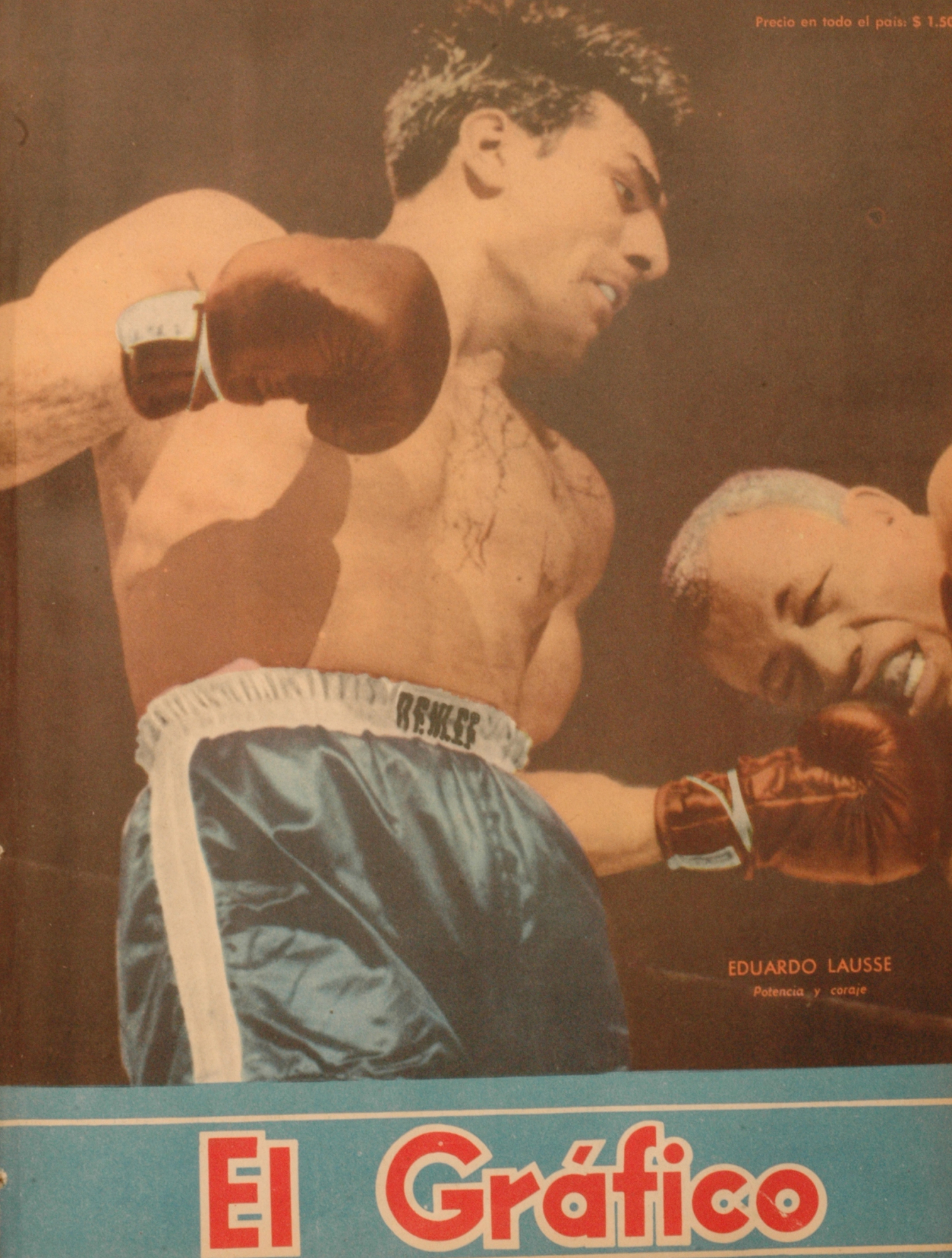 El Grafico del 03 de Junio de 1955. Edicion 1868